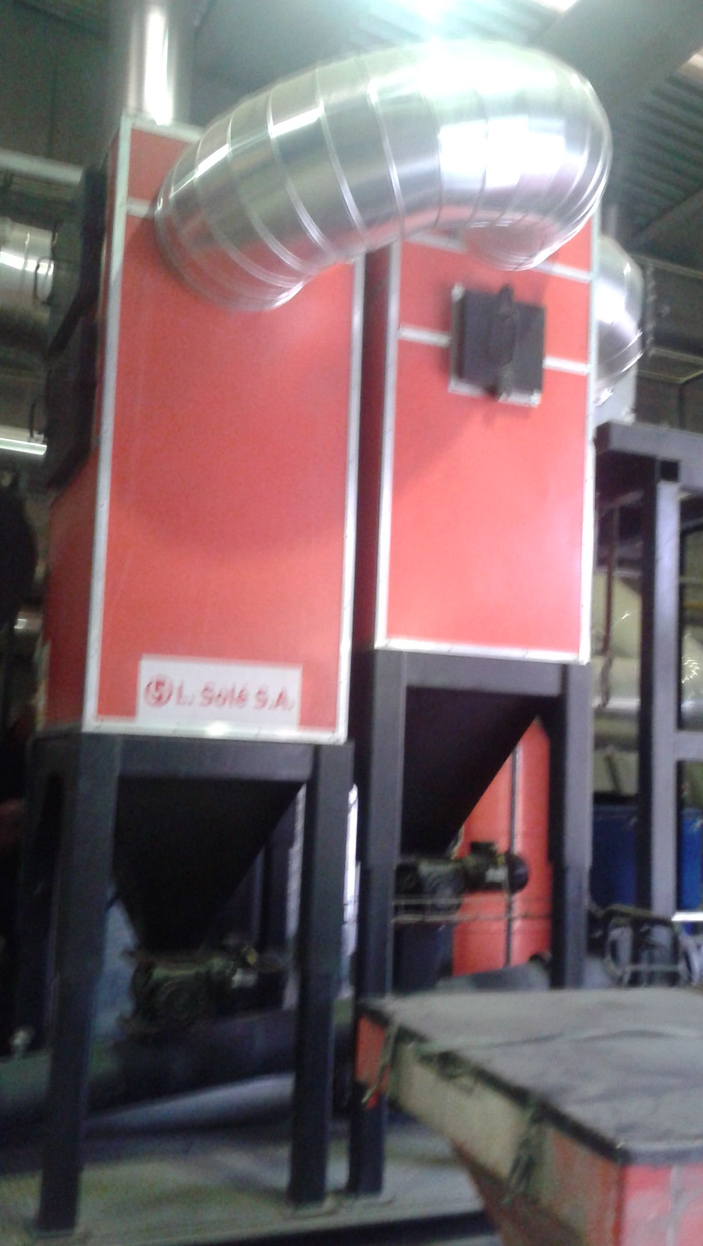 Dos ciclons a la planta de generació de calor amb residus de Molins de rei, que abasteix de calor per a escalfar aigua i per a calefacció a gairebé 700 vivendes del barri de La Granja. La planta constisteix bàsicament en una caldera a la qual es crema fusta residual d'origen industrial, prèviament tallada a trossos que no sobrepassin un pam de llargària. Amb la calor s'escalfa aigua a 90ºC. Els fums no es poden emetre a l'atmosfera tal qual perquè no complirien les normatives mediambientals, per això es fan passar per ciclons, que es fa girar ràpid per separar les partícules sòlides més grosses (cendres) que un cop separades es llencen a un abocador. No es fa cap tractament però per minvar l'escalfor (contaminació tèrmica) dels fums ni per a treure-hi gasos contaminants. La majoria dels fums estan formats per CO2. En primer pla, a la cantonada dreta, es pot veure el contenidor de cendres.